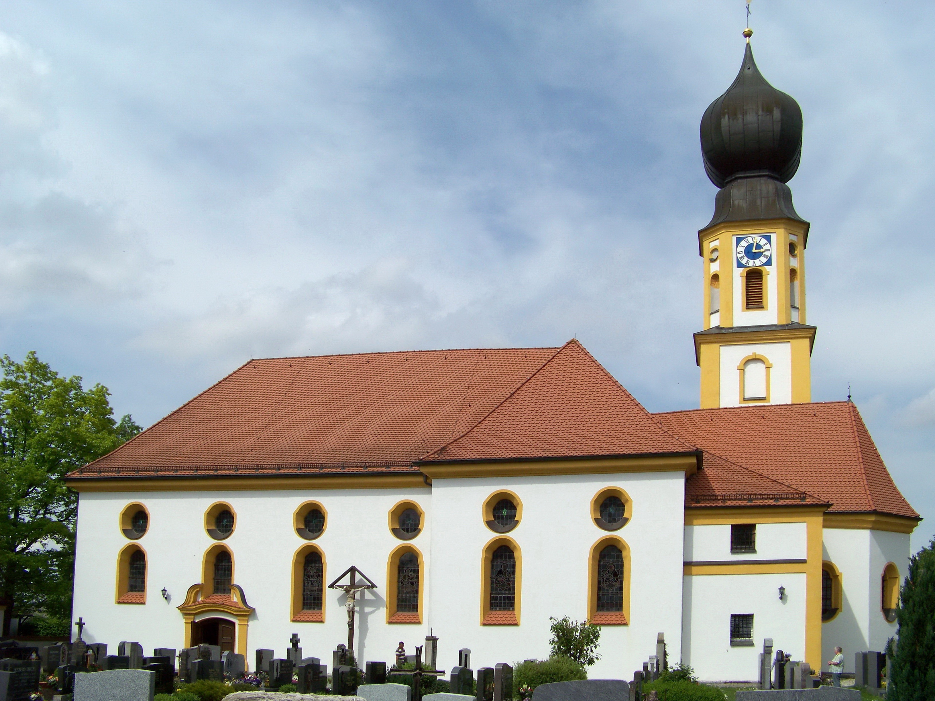 Wallersdorf, Haidlfing. Katholische Pfarrkirche St. Laurentius, neobarocke Saalkirche mit Nordturm, Chor von 1600, 1688 Kapellenanbau, Turm von Dominico Mazio (Dominikus Magzin) 1698, Langhaus 1922–1924; mit Ausstattung.